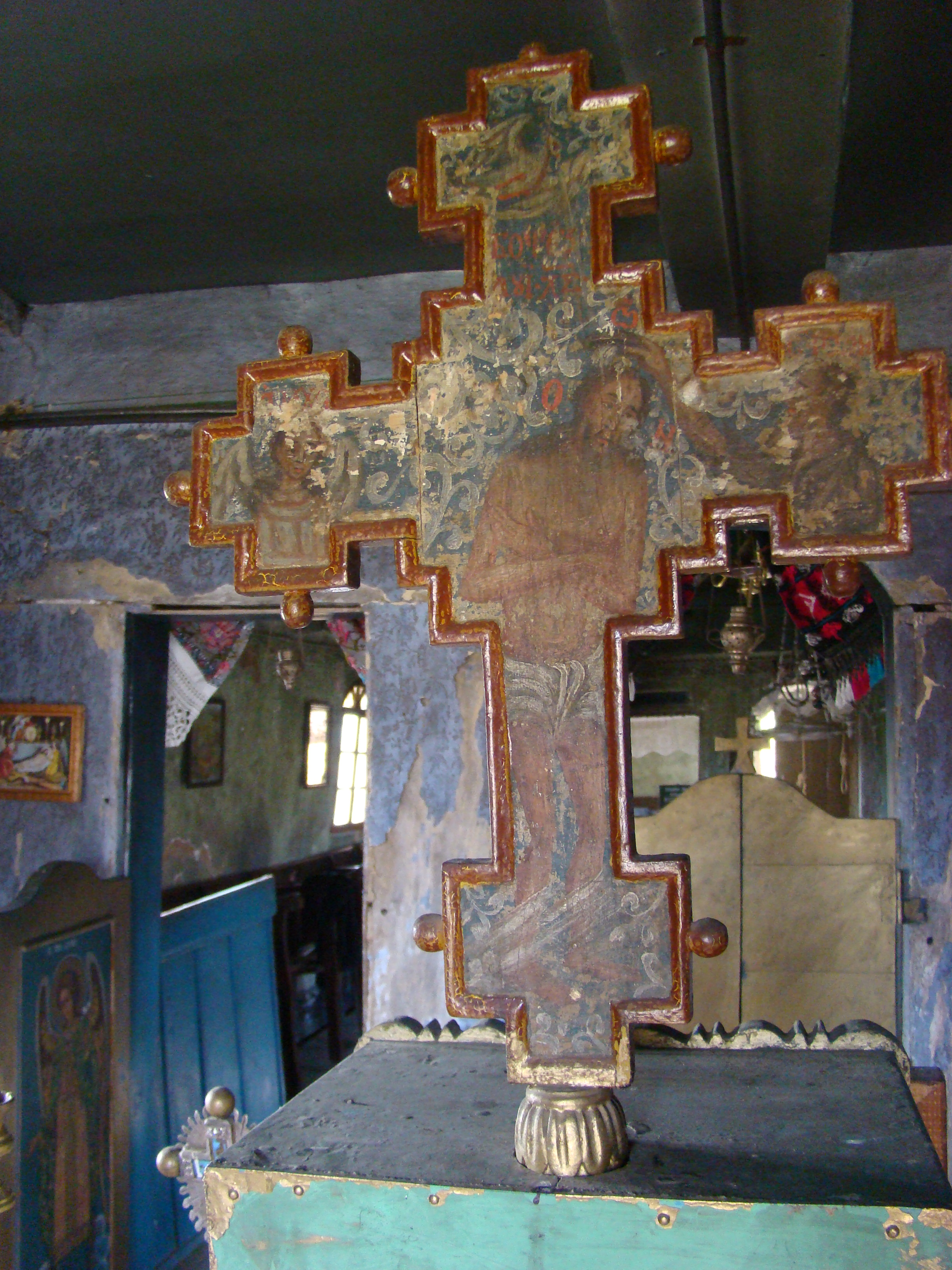 Biserica de lemn „Nașterea Maicii Domnului” din Săucani, județul Bihor